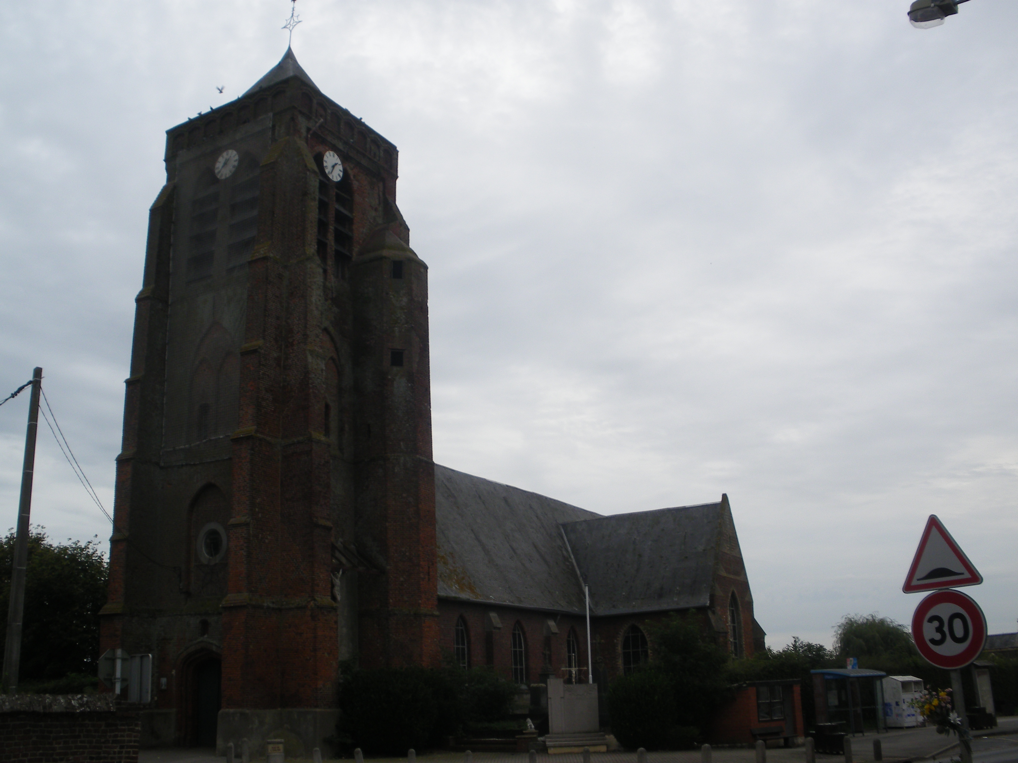 Vue de l'église de Pradelles dans le Nord.